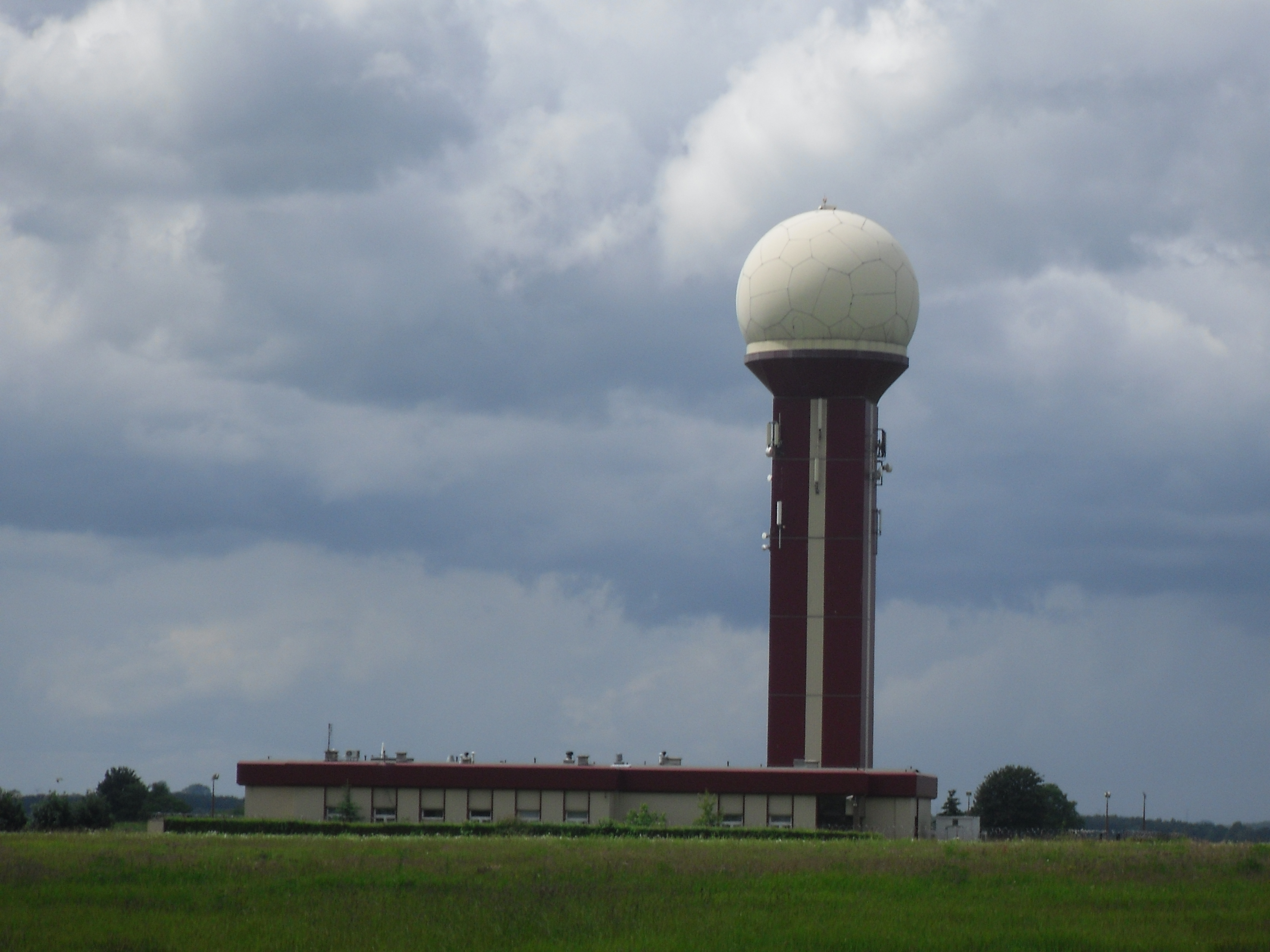 Radar na lotnisku